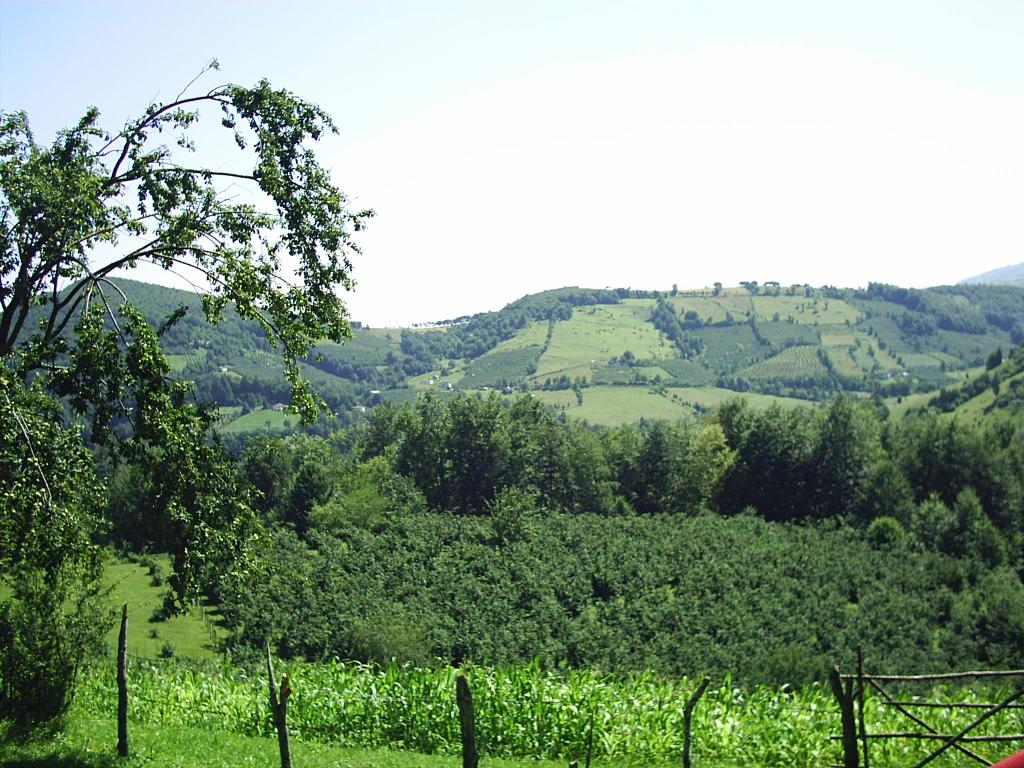 Bu fotoğraf tarafımdan çekilmiştir.